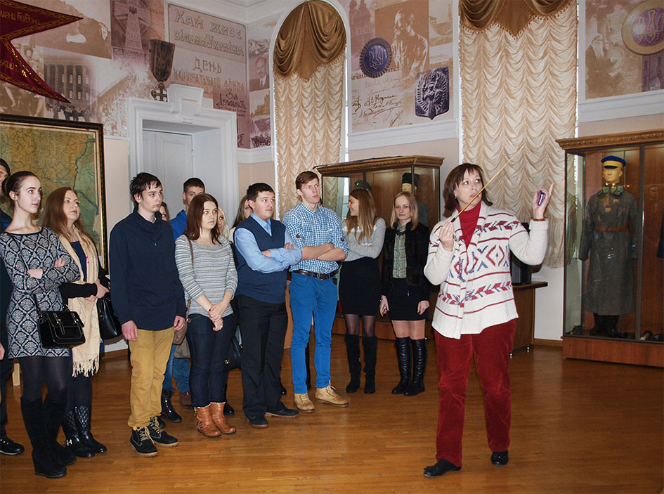 Музей УНР.